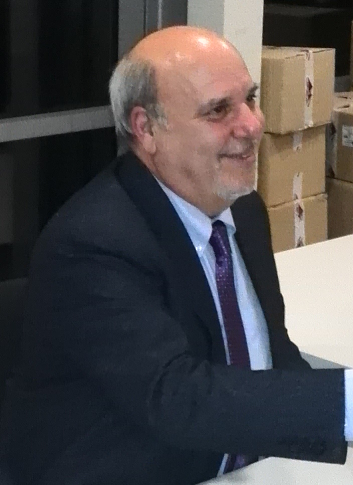 Alan Friedman promuove il suo libro Ammazziamo il gattopardo.